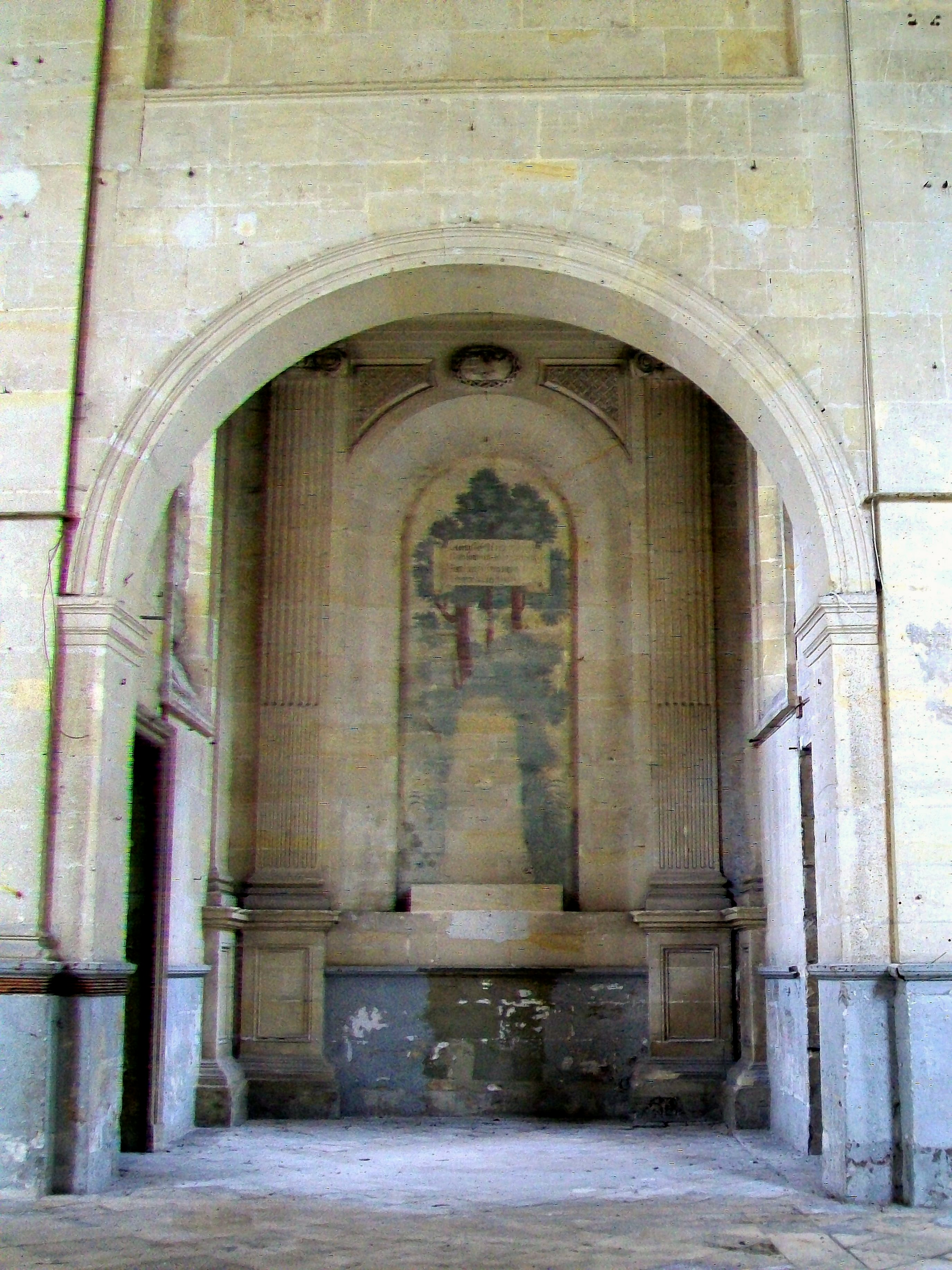 La chapelle, transept est, donnant accès à deux petits locaux annexes.